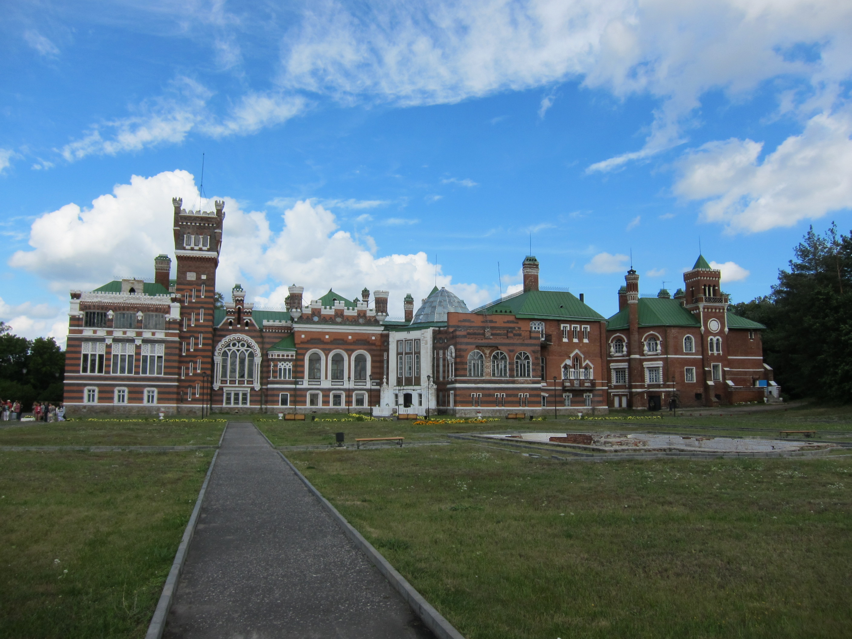 Юрино - замок Шереметевых - южный фасад